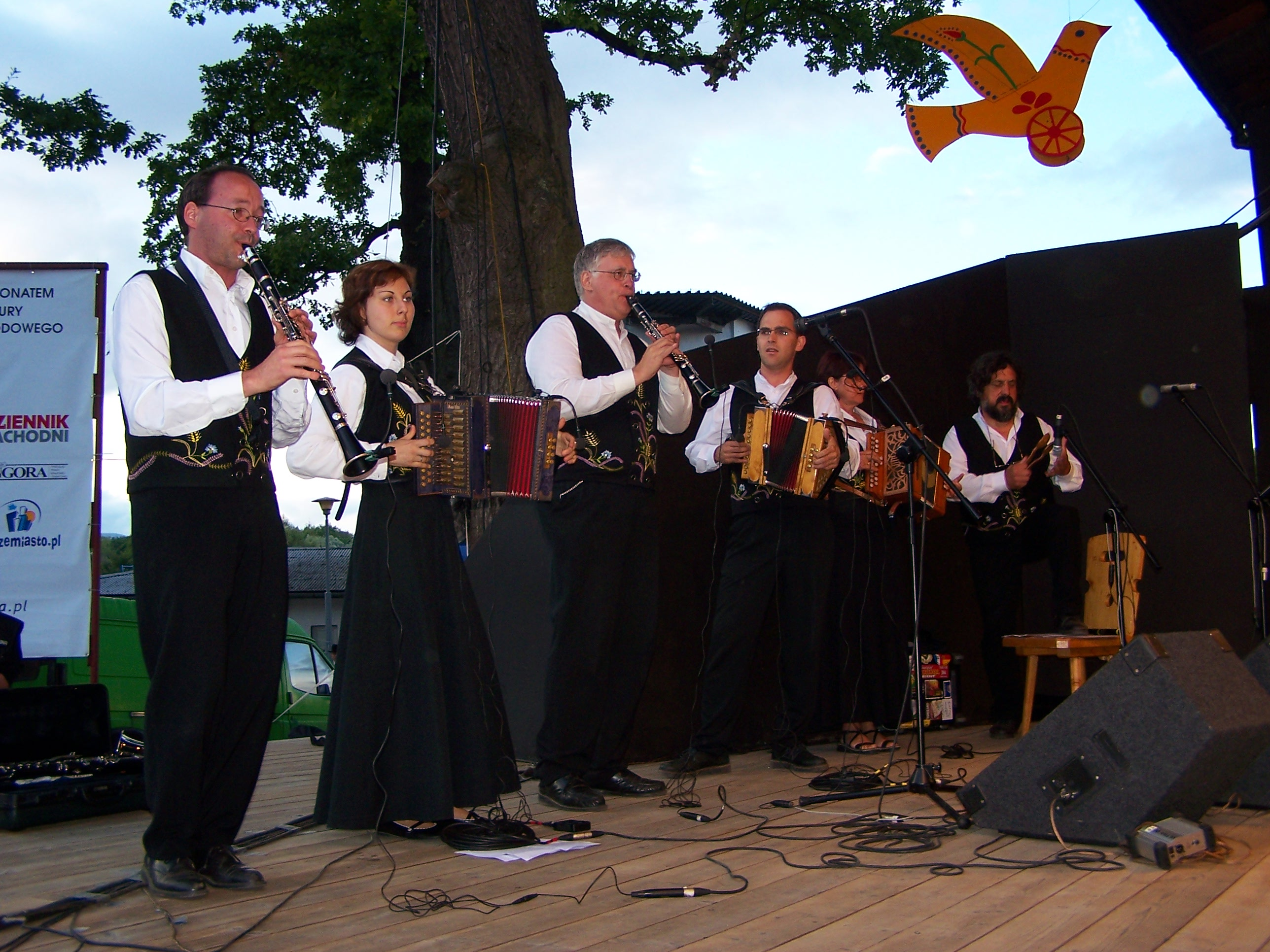 Występ zespołu Cercle Celtique de Rennes (Francja) podczas 43. Tygodnia Kultury Beskidzkiej w Żywcu.